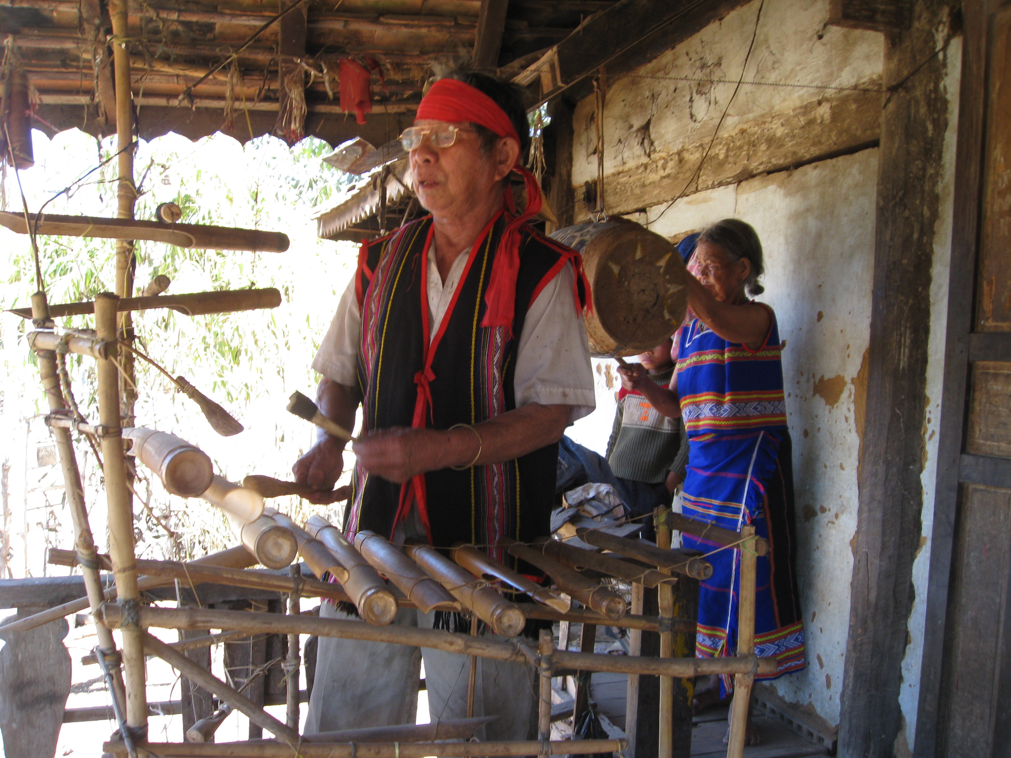 T'rung